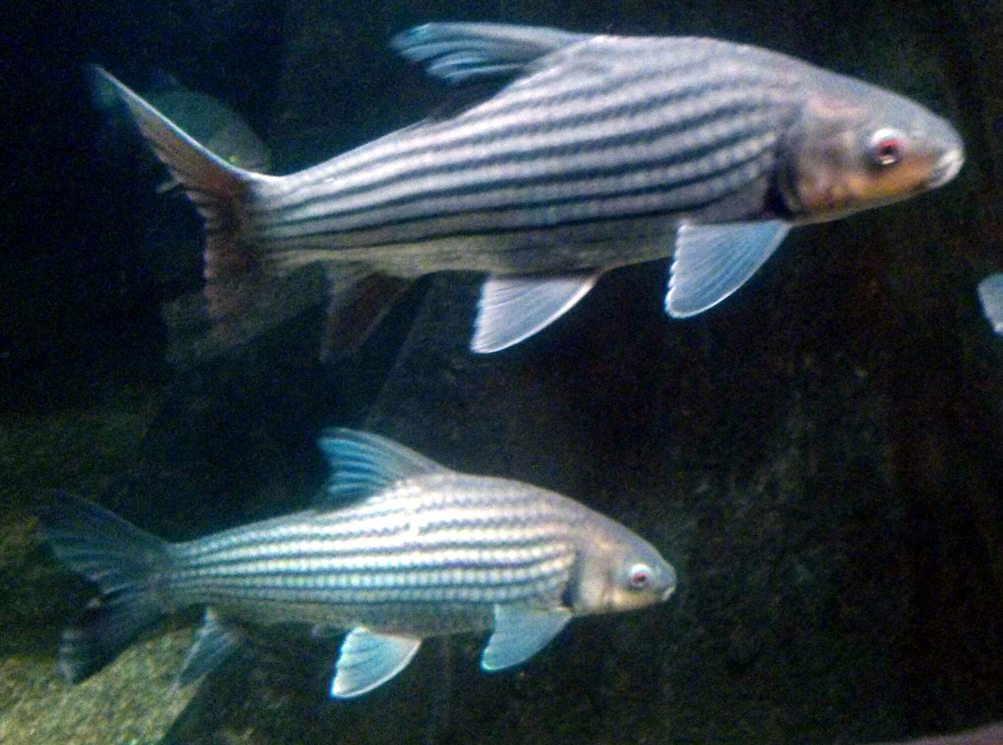 アクア・トトぎふで撮影した、タイガーバーブです。